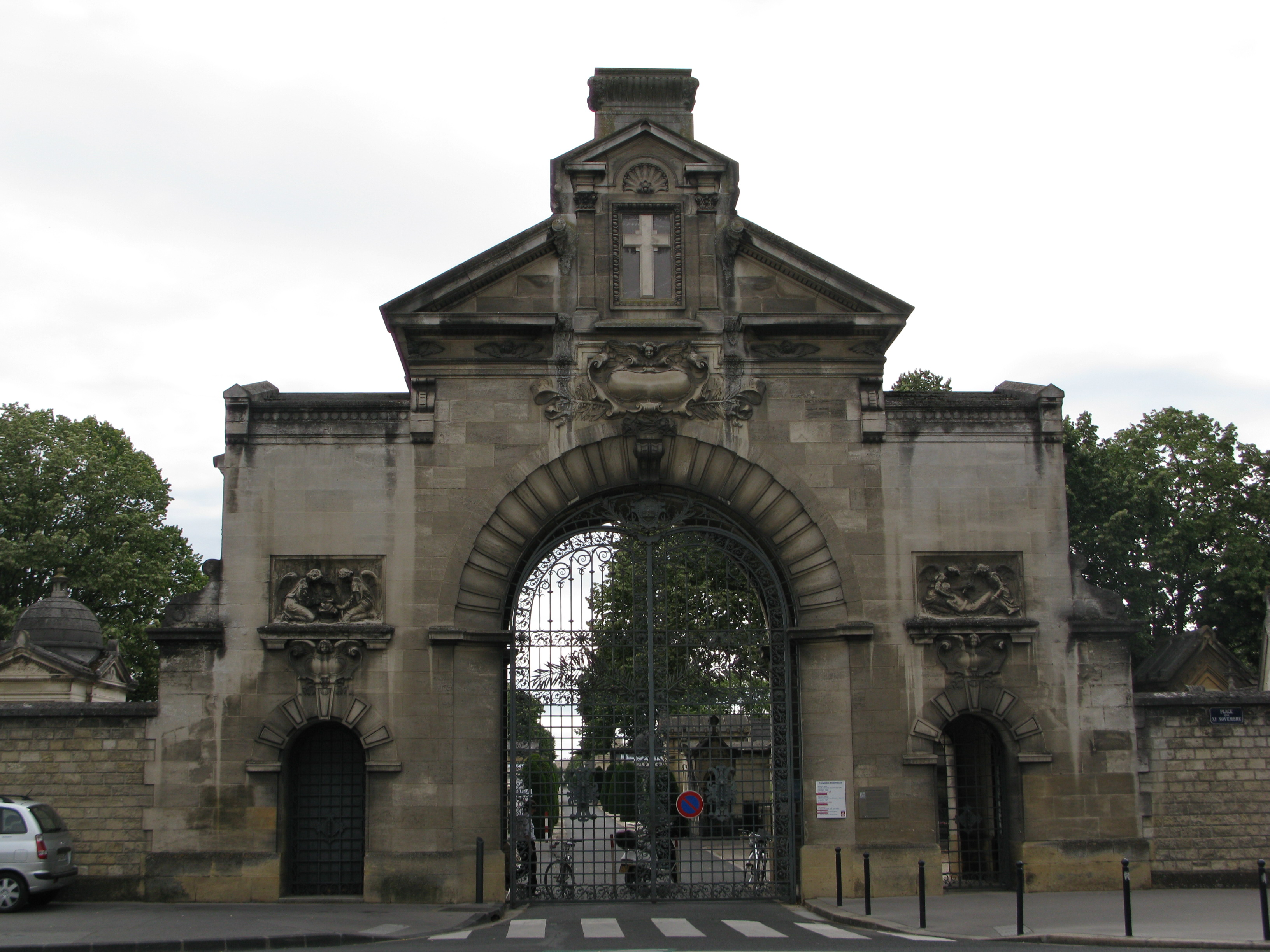 Porte d'entrée du cimetière de la charteuse à Bordeaux.